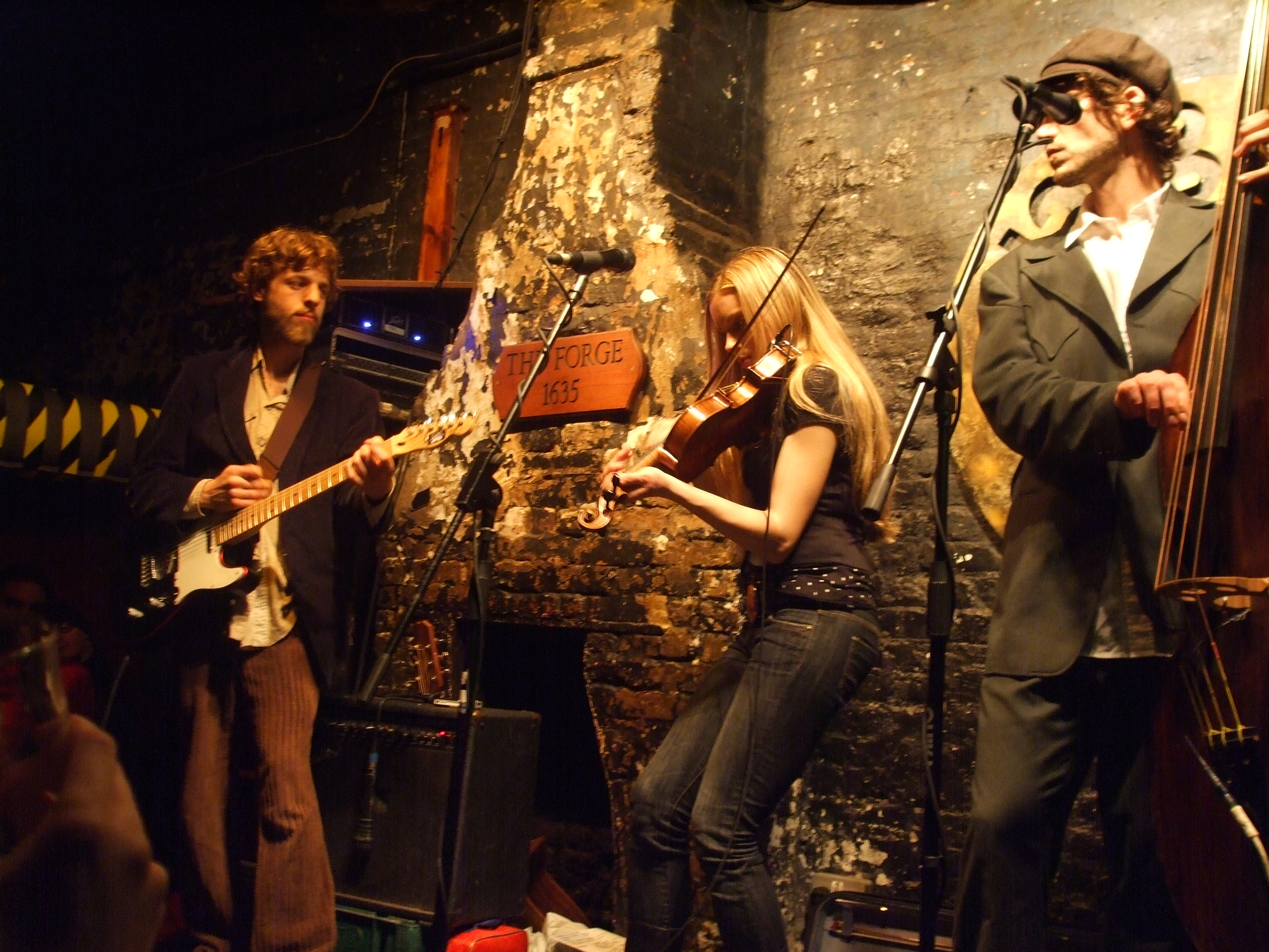 Adam, Kendel and Ollie